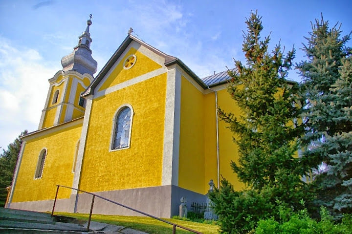 Múcsony